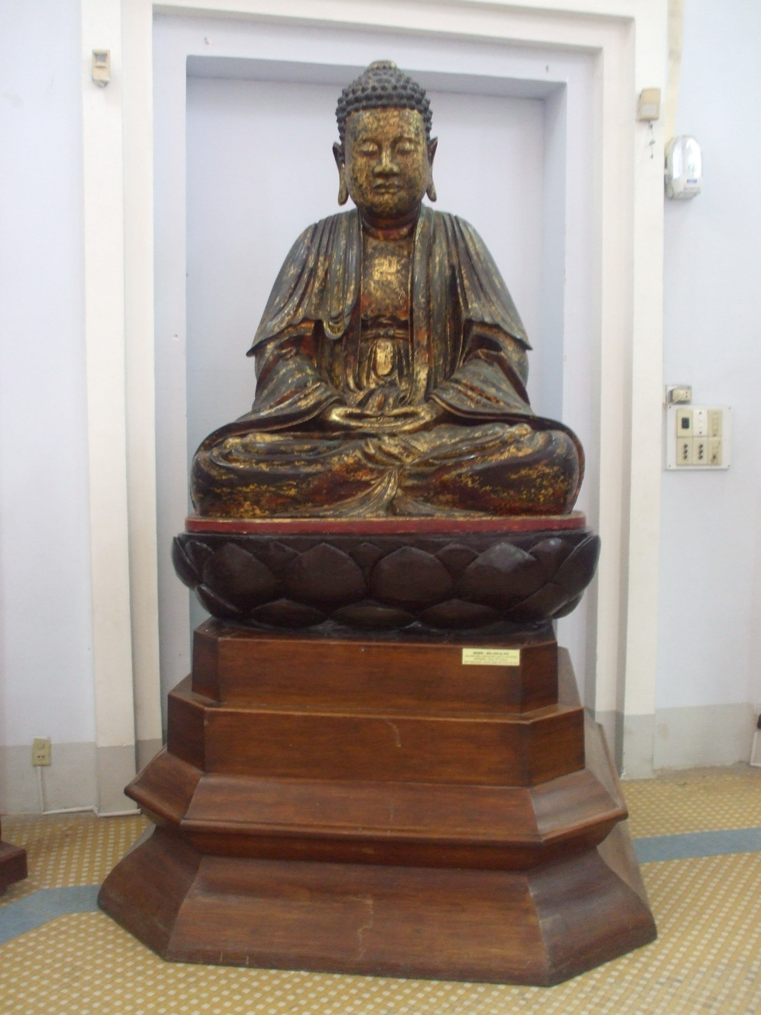 Tượng Phật A-di-đà bằng gỗ sơn son thiếp vàng được tạo tác vào cuối thế kỷ 17 do vua Gia Long dâng cúng cho chùa Khải Tường. Cổ vật hiện đang được trưng bày tại Bảo tàng Thành phố Hồ Chí Minh, Việt Nam.